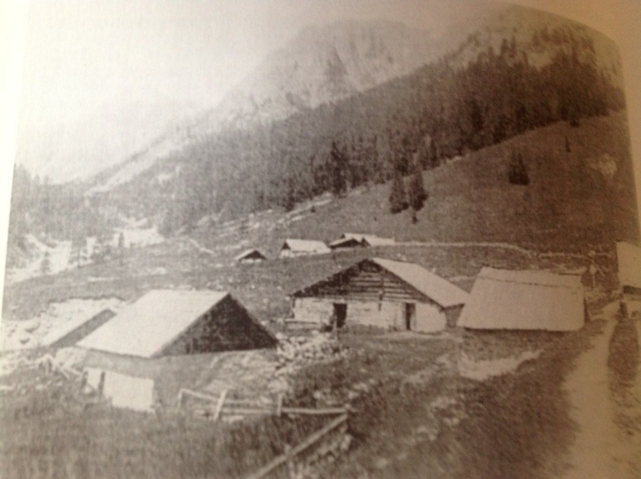 Griosch bei Vnà (Unterengadin, Kanton Graubünden), im Jahre 1901